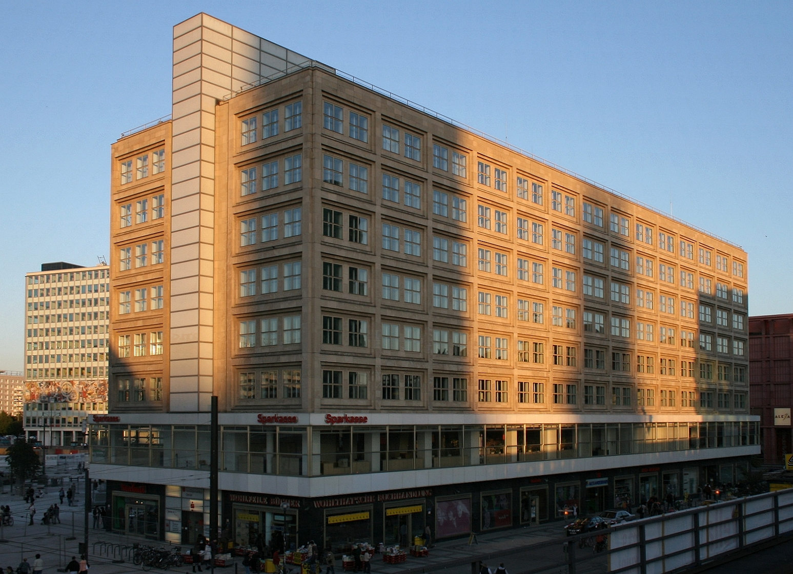 Berliner Sparkasse, Alexanderplatz in Berlin.